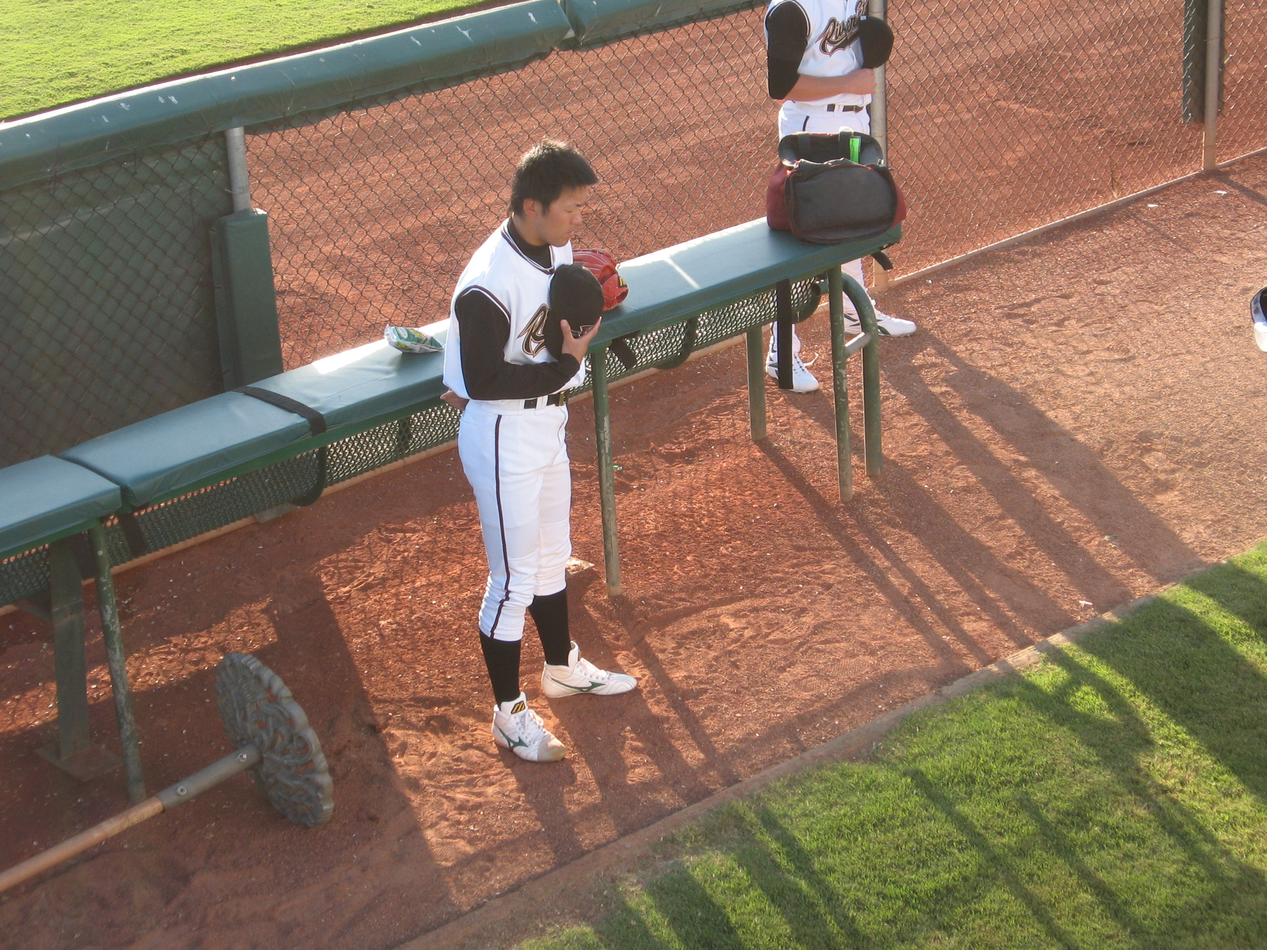 Kazuhito Tadano 06:06, 17 April 2008 . . Jrchun . . 2,592×1,944 (1.83 MB)